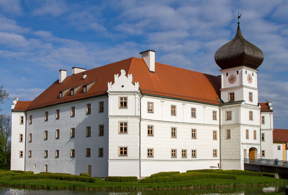 Wasserschloss Hohenkammer; geschlossene Vierflügelanlage mit drei Geschossen, Laubeninnenhof, vier erkerartigen Ecktürmen und Eingangsturm, im Stil der Renaissance entstanden nach 1551, im späten 17. Jh. ausgebaut, Außenbau und Inneres 1973-75 z.T. verändert; mit SchlossgrabenThis is a photograph of an architectural monument.